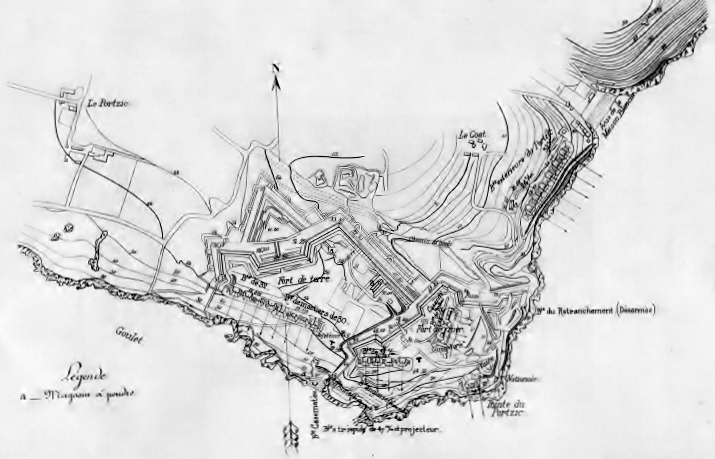 mappa Forte Portzic